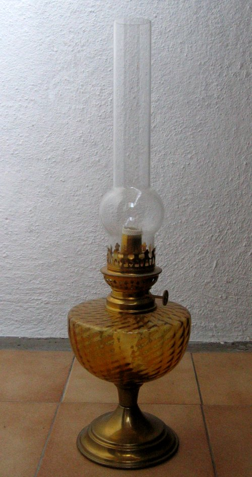 Une lampe à pétrole (copie d'ancien). Prise par moi-même le 30 juin 2006. Domaine Public.